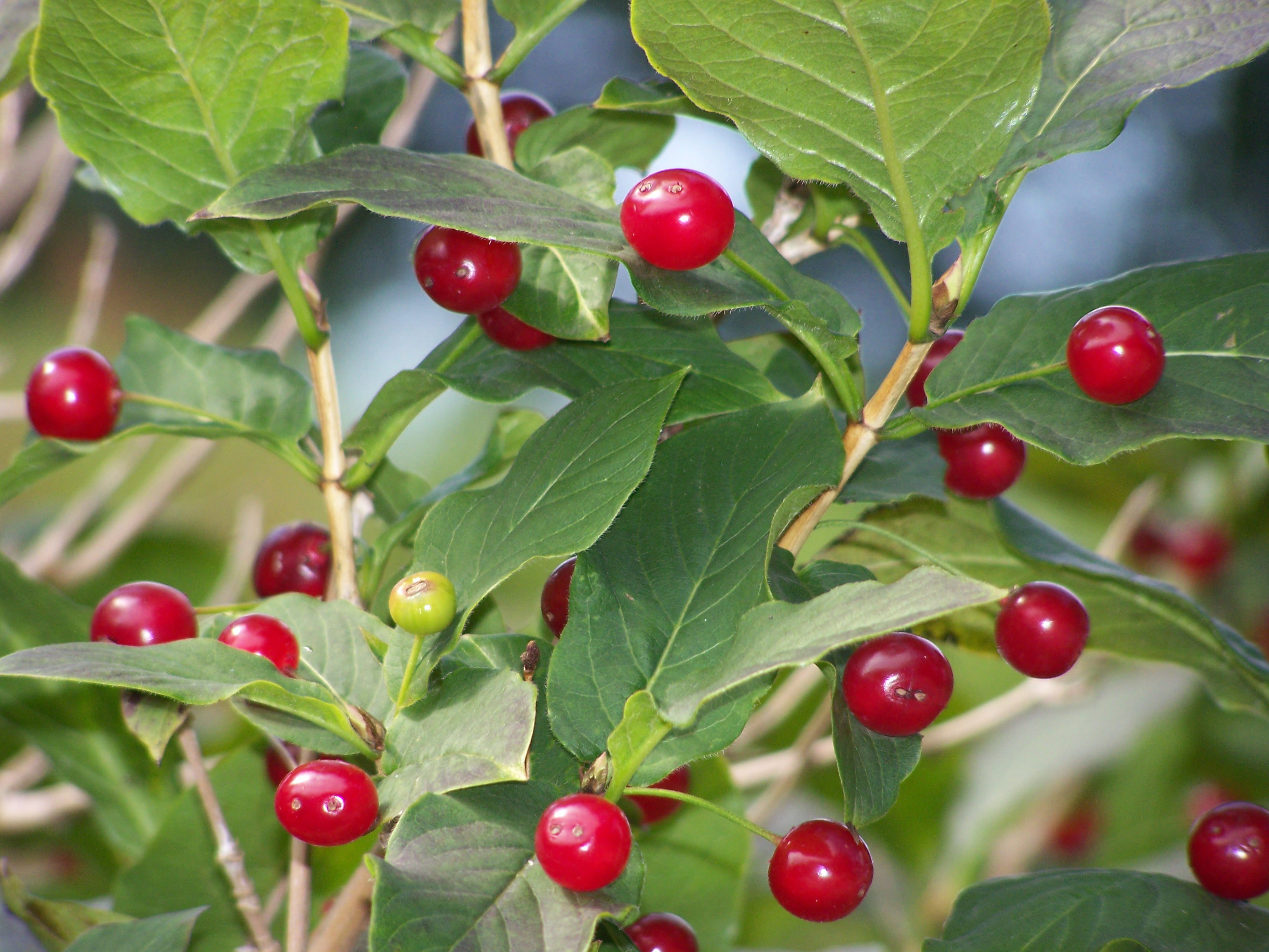 Alpen Heckenkirsche (Lonicera alpigena), Botanischer Garten Berlin